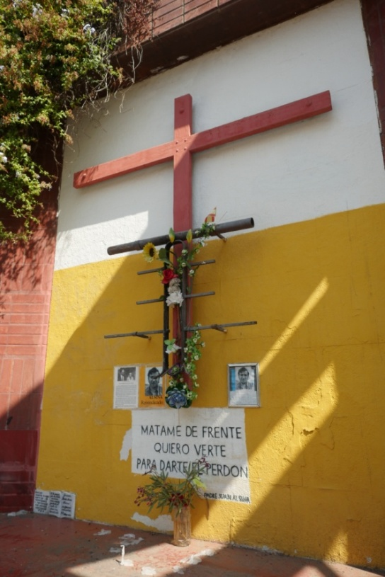 Visión lateral del altar.